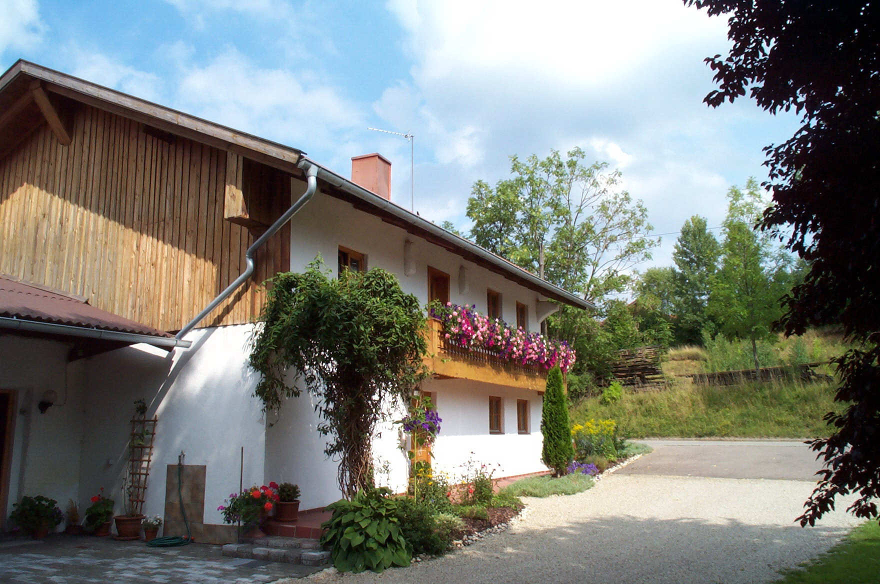 Haimelkofen Nr. 6, Kleinbauernhaus aus der 1. Hälfte des 18. Jahrhunderts.